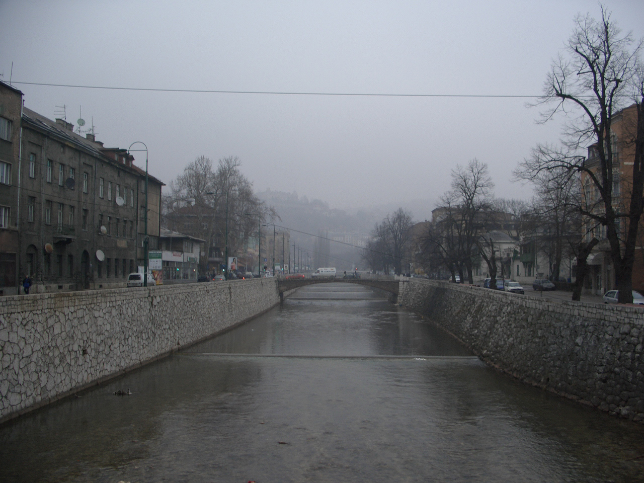 Miljacka između Careve ćuprije i Latinske ćuprije.